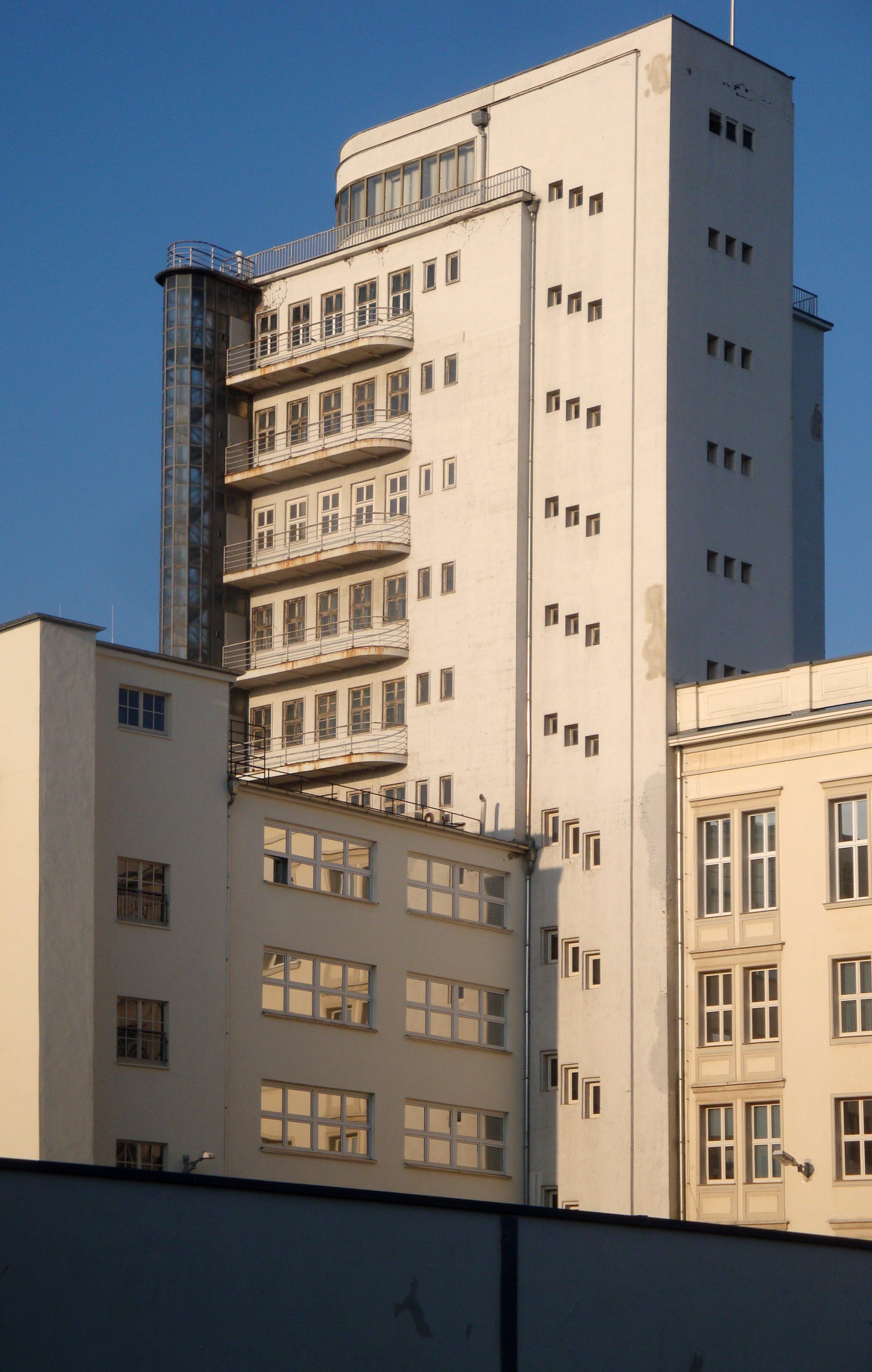 Faber-Hochhaus, auch Volksstimme-Hochhaus, Magdeburg, Bahnhofstraße 17, erbaut 1930-1932, erstes Hochhaus der Stadt, Architekt: Paul Schaeffer-Heyrothsberge